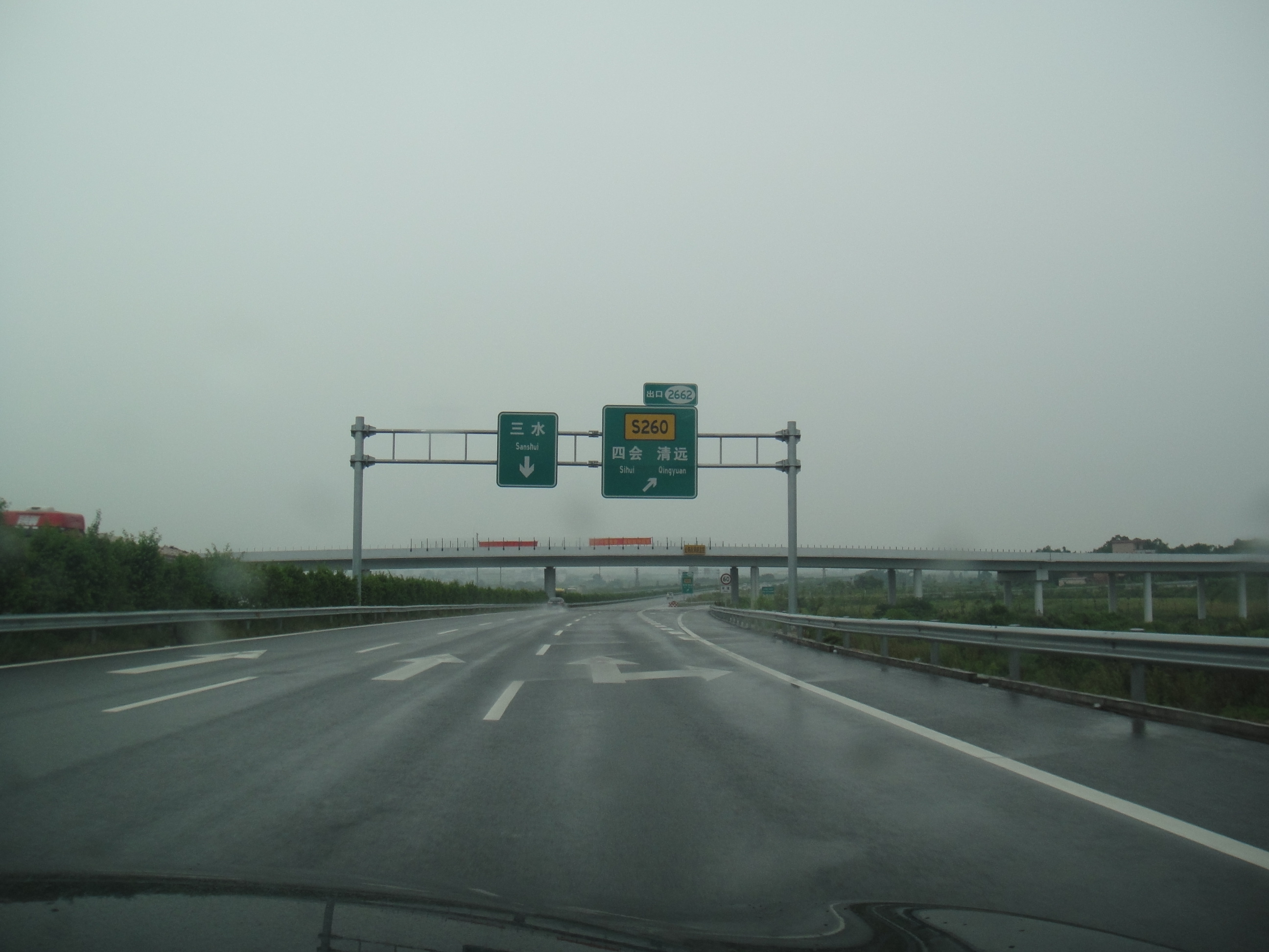 广贺高速（G55）四会段